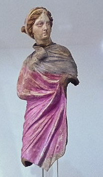 Statuetta in terra cotta policroma. Museo archeologico nazionale di Taranto, – Italia.